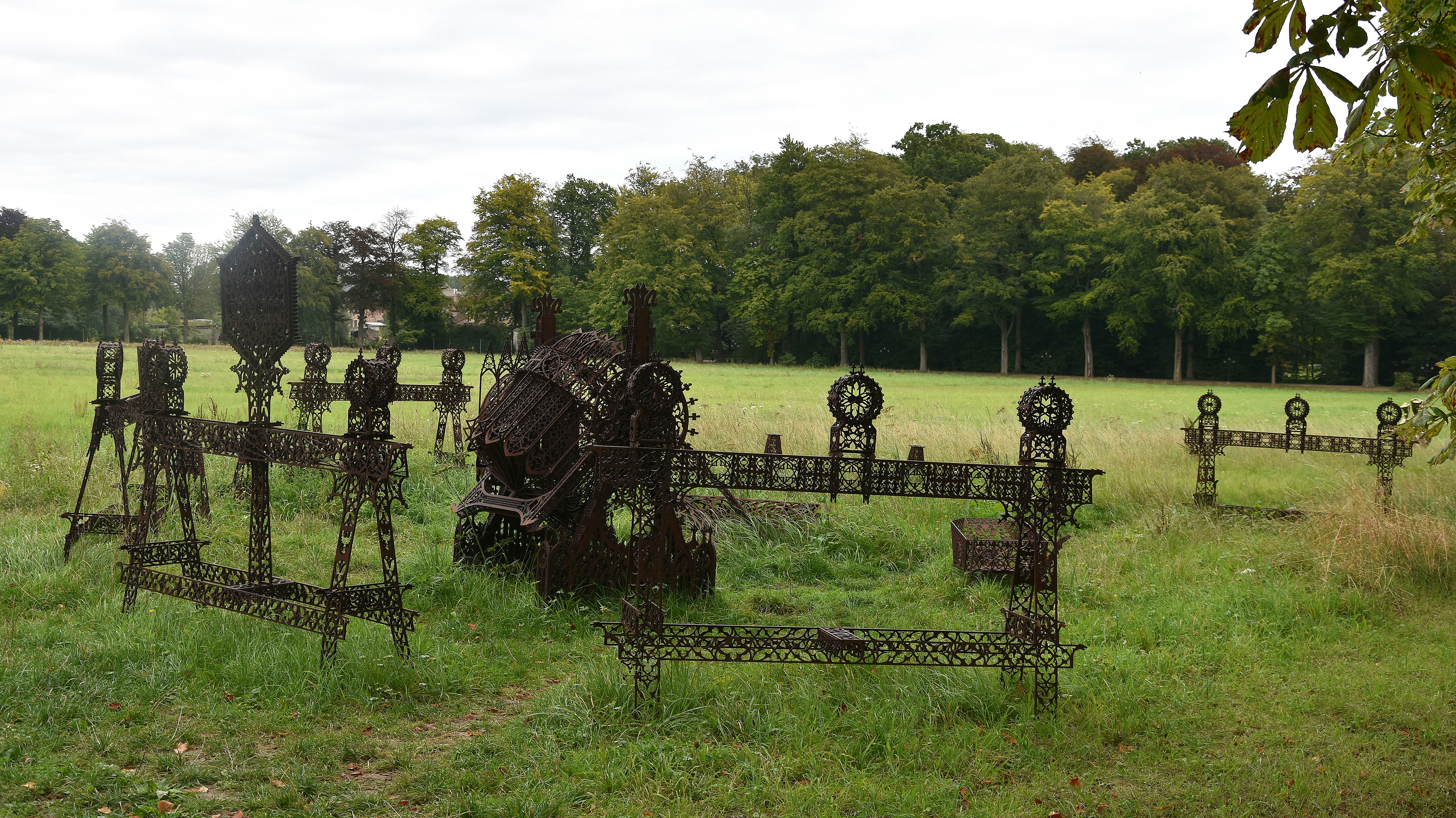 Wim Delvoye (1965) Moorsel 3-09-2019 This photo of movable heritage has been taken in the Flemish Region